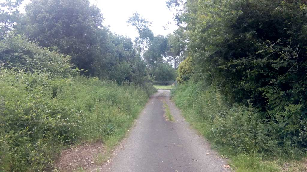 Acceso a Paxarón.